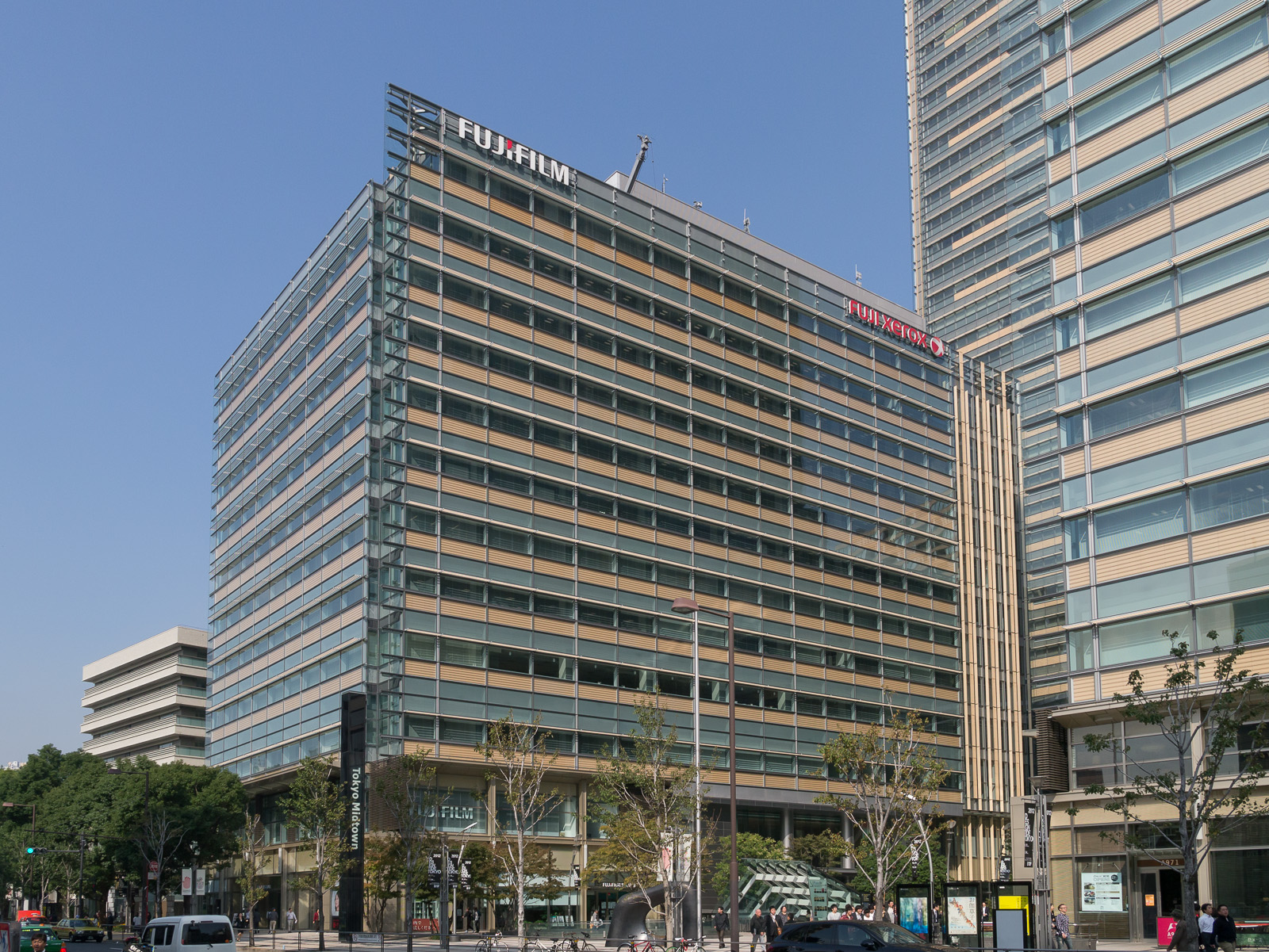 東京ミッドタウンWestビル。富士フイルム、富士ゼロックス本社。